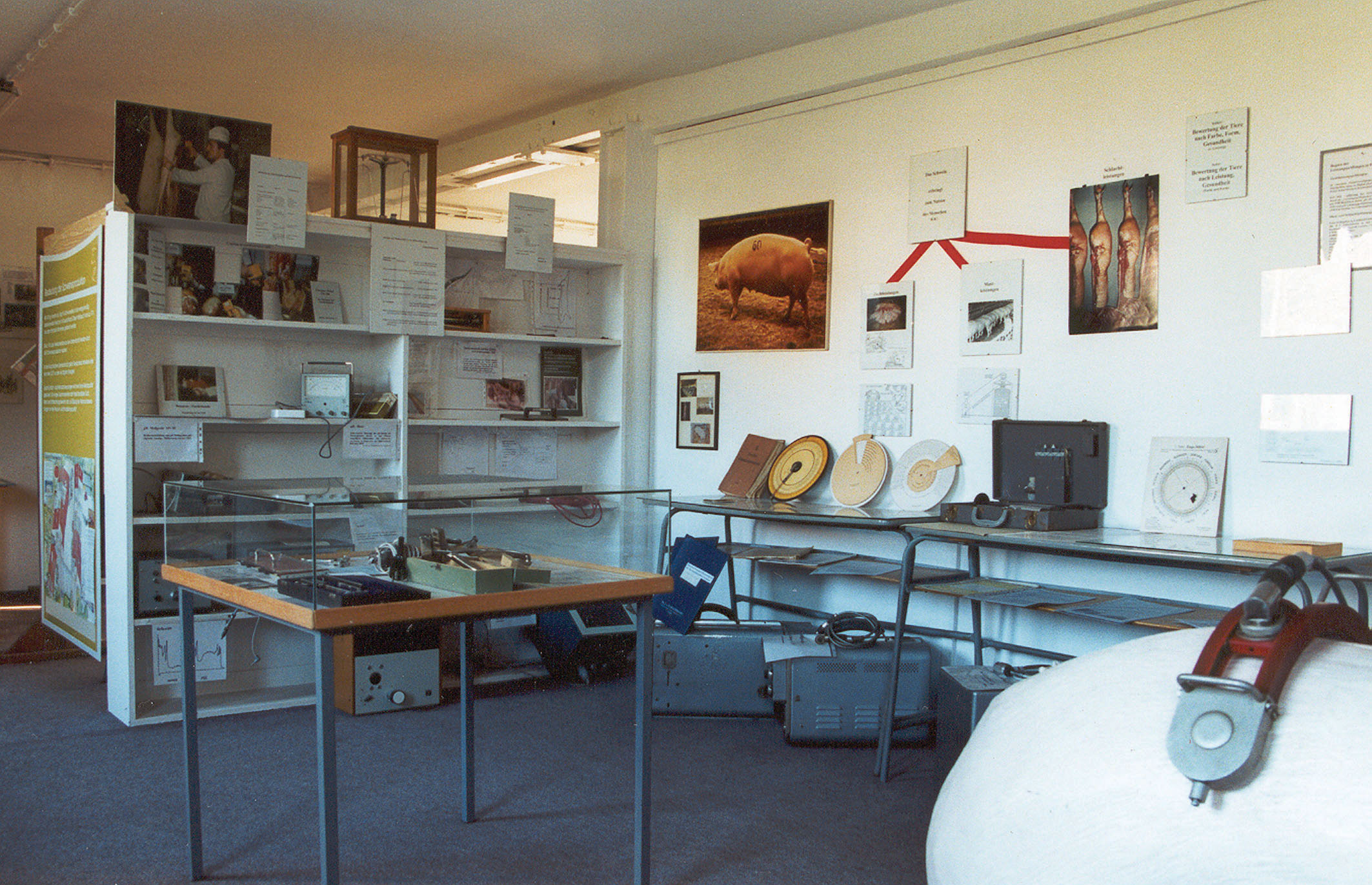 Blick in einen Ausstellungsraum des Deutschen Schweinemuseums über die Leistungsprüfung. Exponat aus dem Deutschen Schweinemuseum Ruhlsdorf.